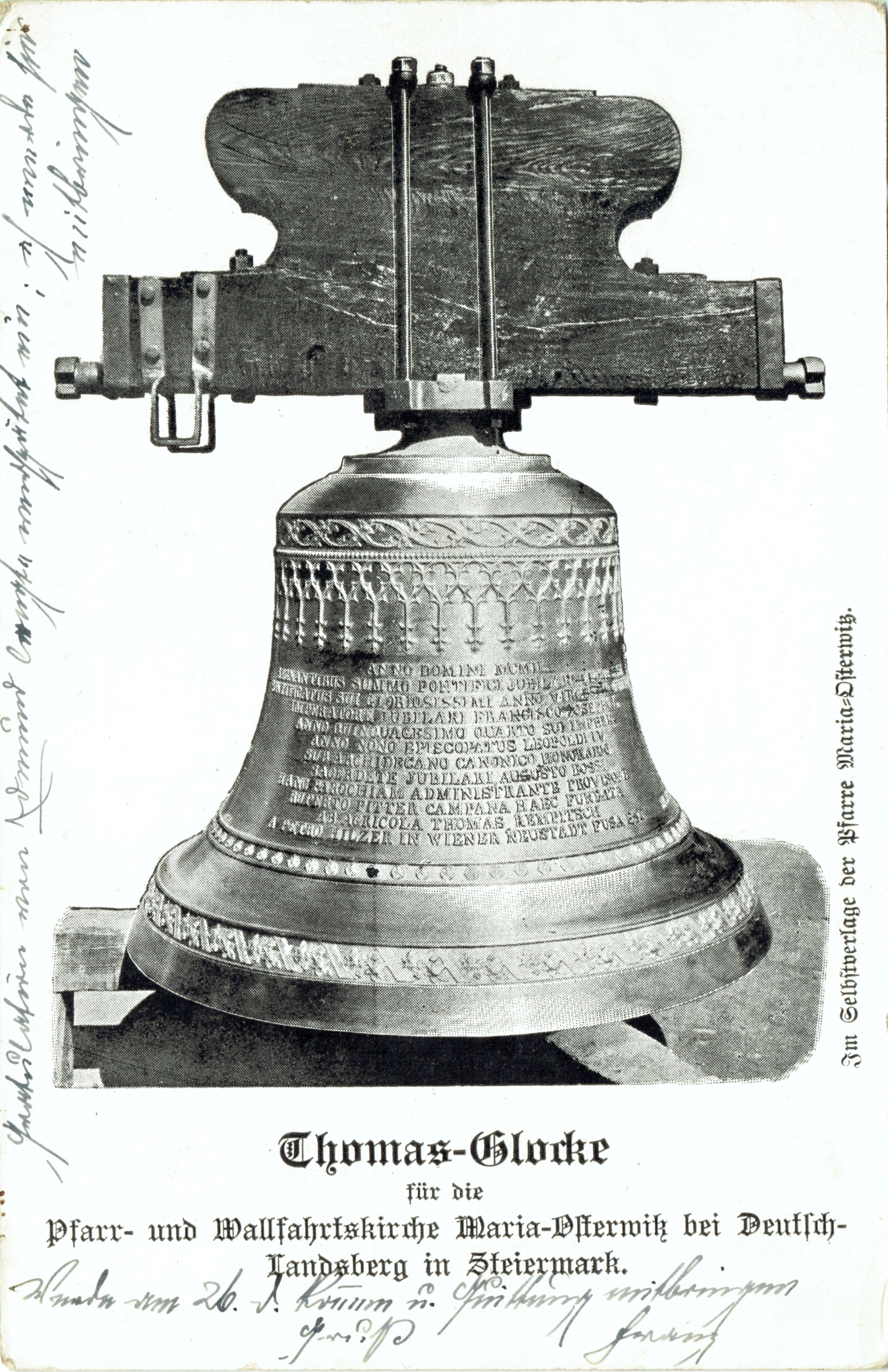 Glocke der Pfarrkirche Maria Osterwitz aus 1902, Thomas Glocke, Finanzierung durch den Bauern Thomas Rempitsch